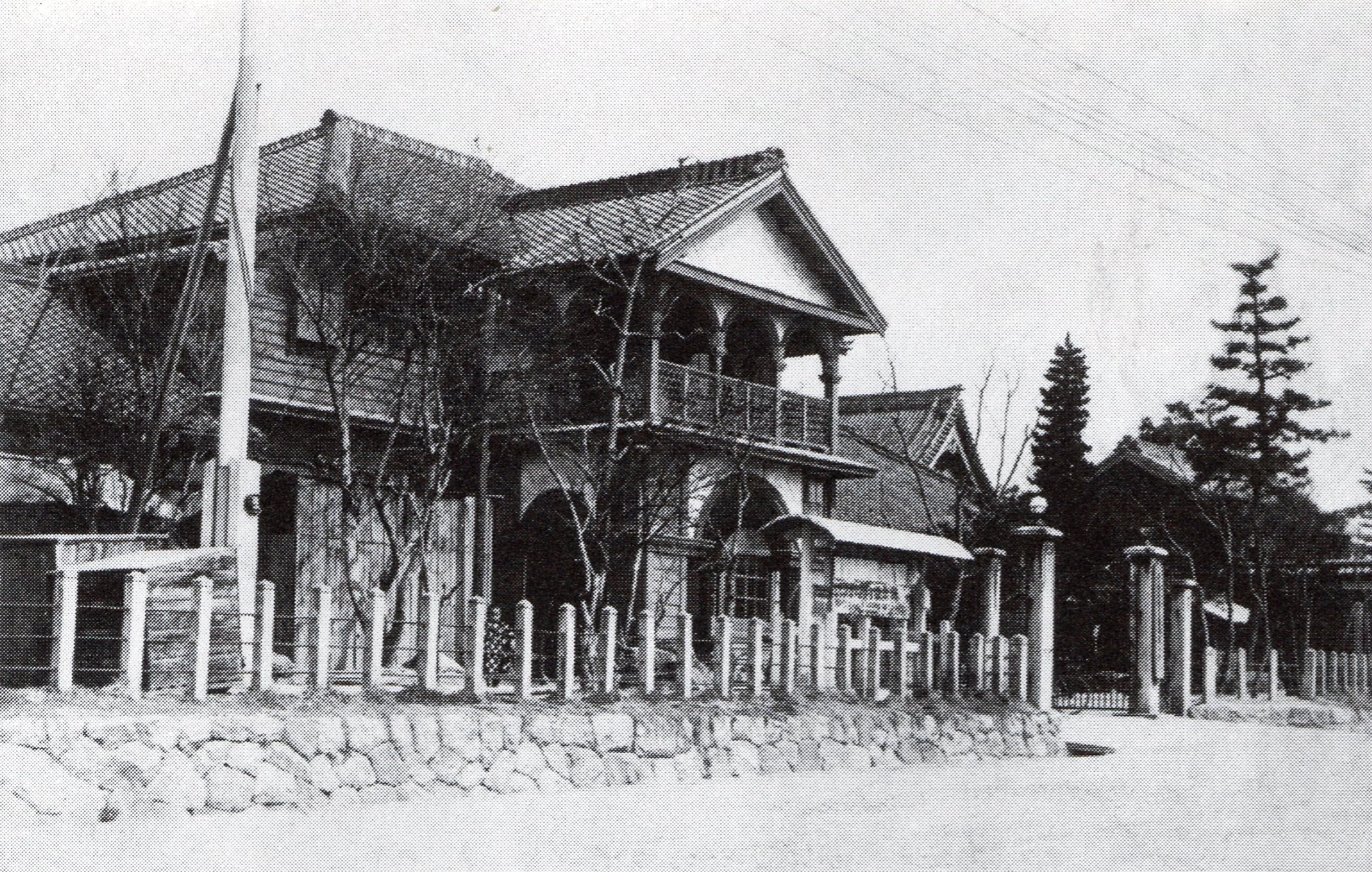 西尾町役場。1912年に幡豆郡役所として建てられた。1926年6月、郡役所が廃庁されたため、同年9月に愛知県から譲り受けて西尾町役場となった。現在の西尾市鶴ケ崎町にあり、1961年まで使用された。